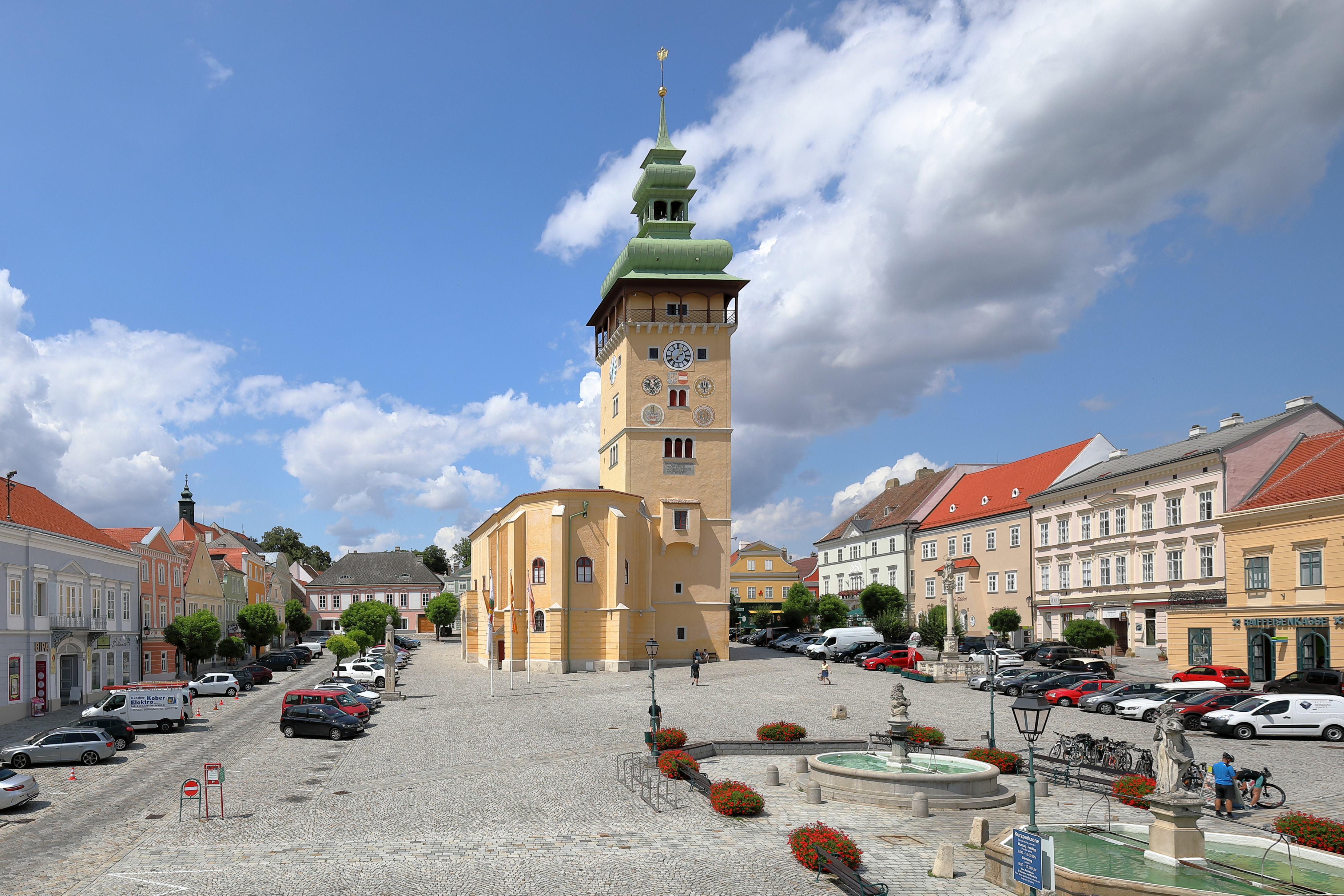 Ostsüdostansicht des Hauptplatzes der niederösterreichischen Stadtgemeinde Retz.Der große, rechteckige Platz hat eine Fläche von ca. 1,2 ha. Das ehemalige Rathaus ist der Mittelpunkt. Ursprünglich als gotische Kirche gebaut, blieb sie unvollendet und wurde Mitte des 16. Jahrhunderts zu einem Rathaus mit Rathausturm umgebaut. Weitere bedeutende Bauwerke am Hauptplatz sind das 1576 errichtete Sgraffitohaus, das Verderberhaus (erbaut 1577-1583), die 1744/45 errichtete Dreifaltigkeitssäule. Eine Pest- bzw. Mariensäule (errichtet 1680) und ein Pranger, sowie zwei Brunnen aus dem Ende des 18. Jahrhunderts. Einer mit einem Löwen, der das Stadtwappen hält und der andere mit einer Frauengestalt.